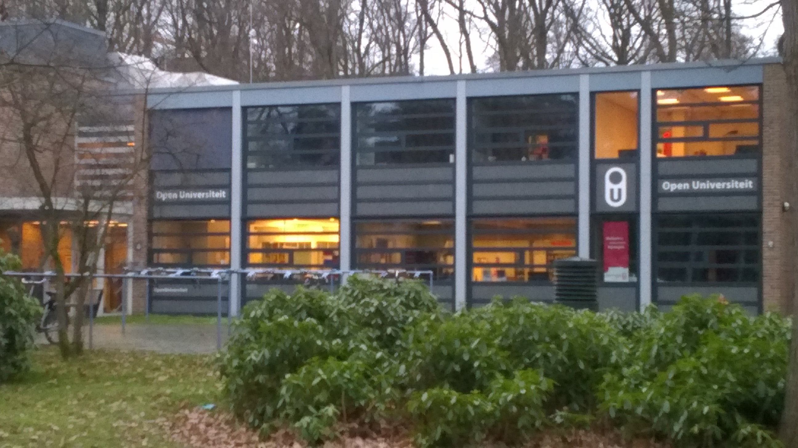 Pand van Studiecentrum Nijmegen van de Open Universiteit gelegen aan de Erasmuslaan 9. Op de voorgrond zijn rododendrons te zien. Links daarvan een hangfietsenstalling. Op het gebouw staat 'Open Universiteit' en het logo.